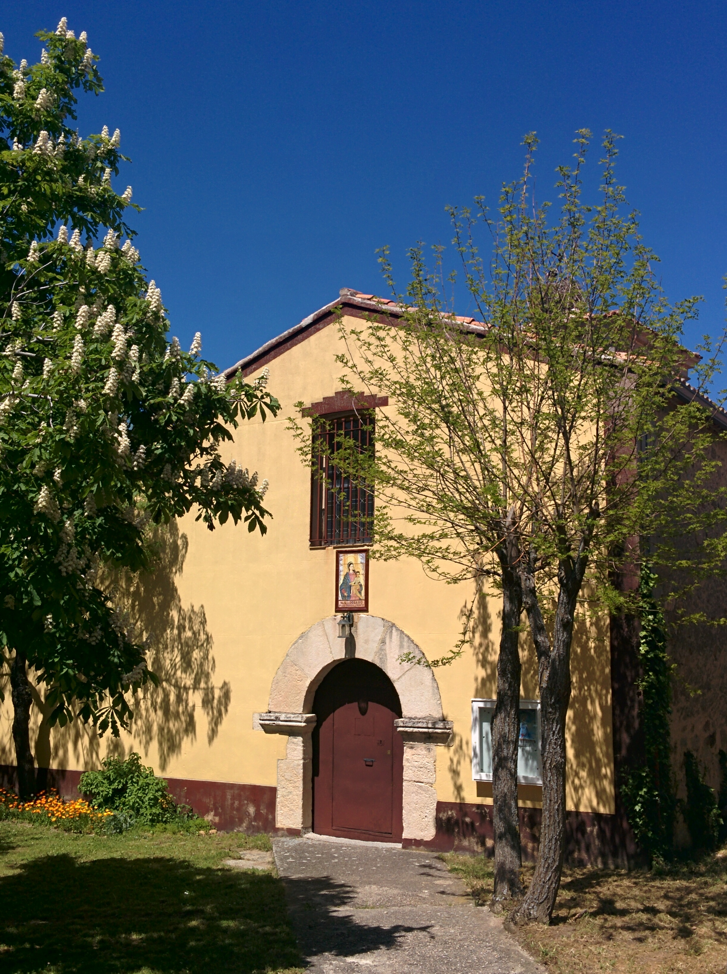 Iglesia de San Julián, en Ortigosa del Monte (Segovia, España).